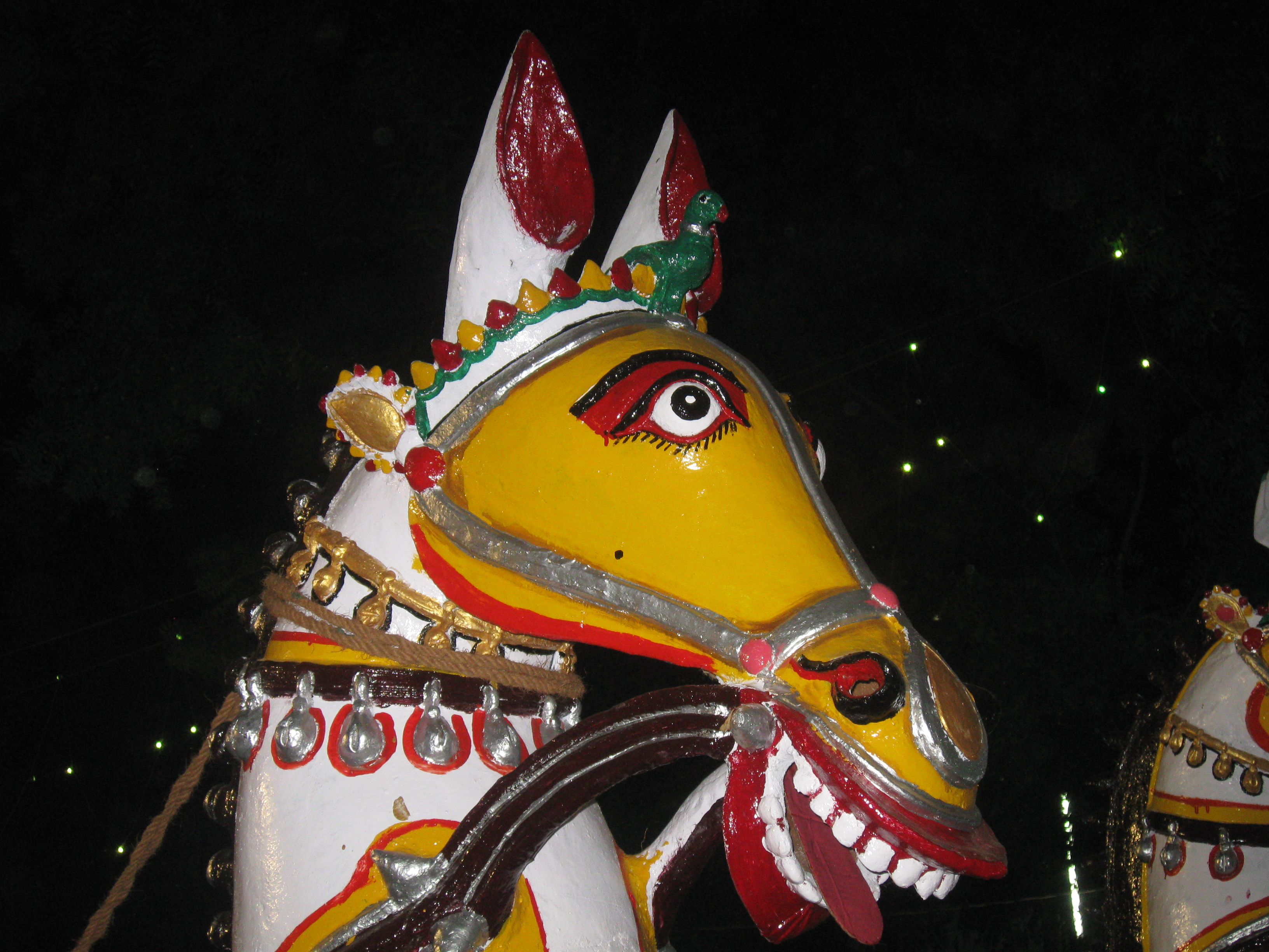 கிராமங்களில் நடத்தப்பெறும் புரவியெடுப்புத் திருவிழாவில் கம்பீரமாகக் காட்சியளிக்கும் மண்புரவியின் அழகான தோற்றம்.